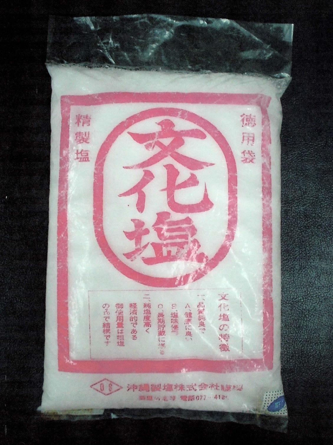 沖縄製塩株式会社の商品、精製塩「文化塩」徳用袋